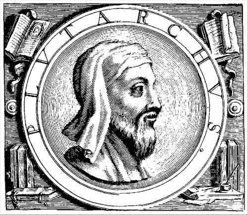 Plutarco, filósofo griego.